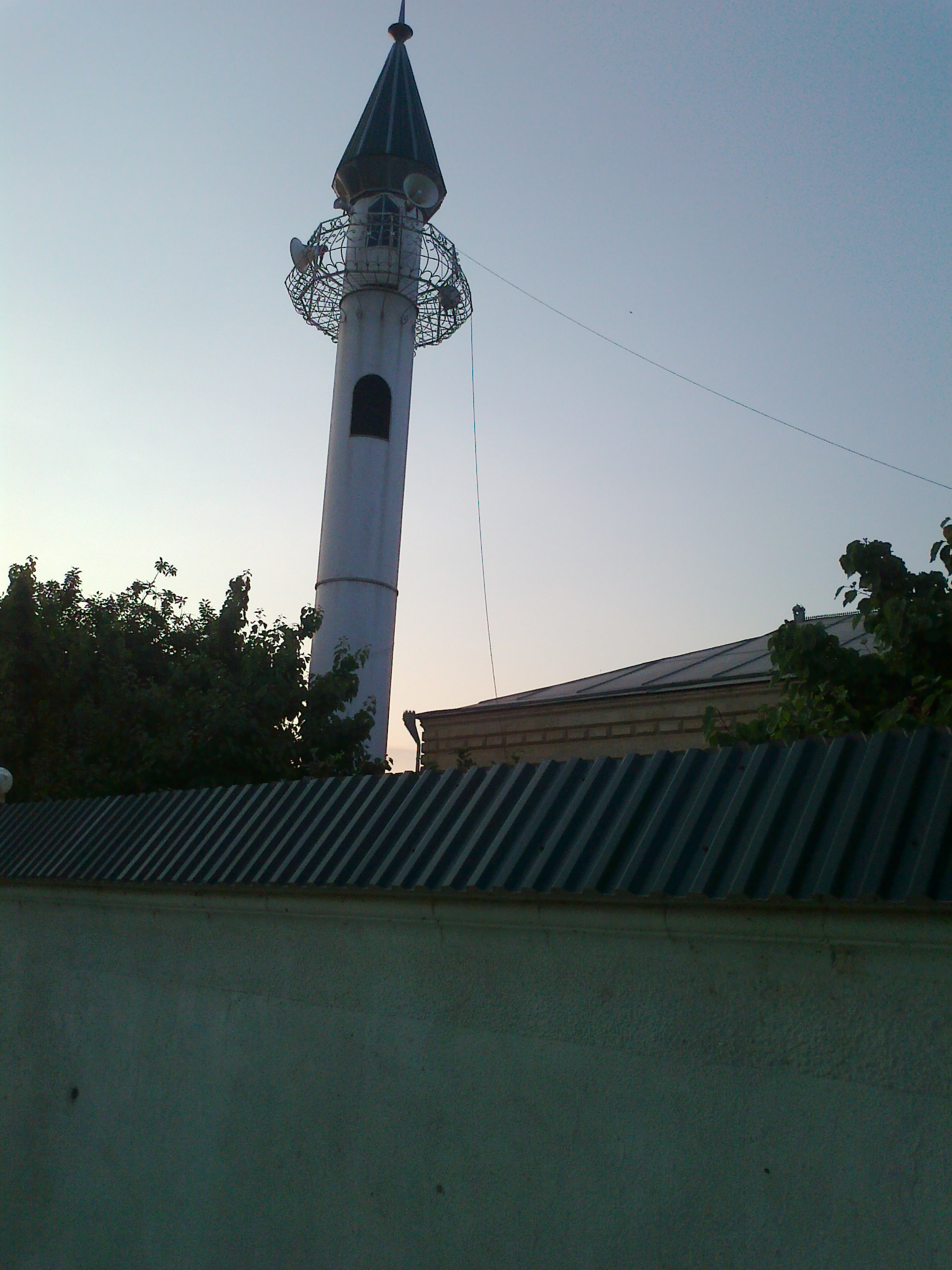 Минарет служит для призыва мусульман к молитве.